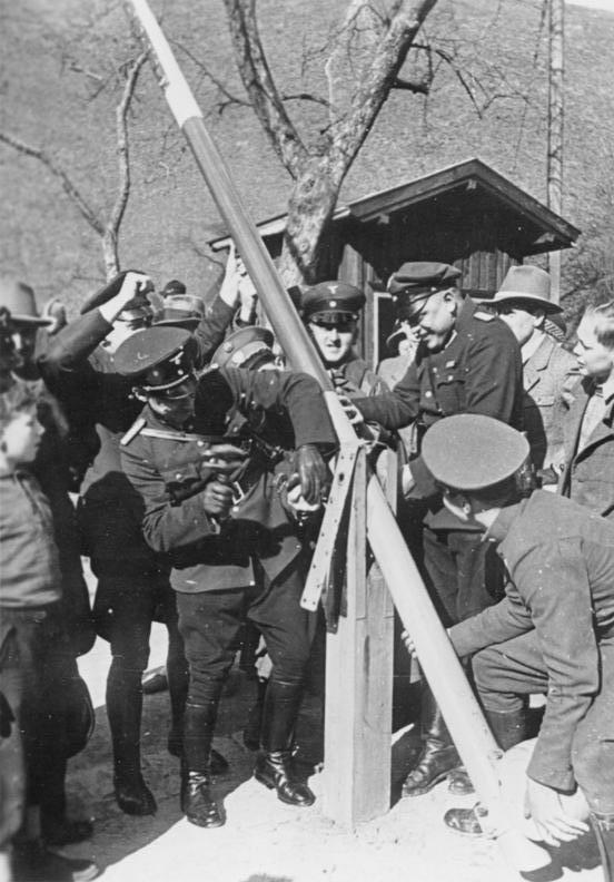 Österreich: nach vollzogenem Anschluss wurden von österr. Grenzbeamten und ihren deutschen Kameraden die Grenzpfähle niedergelegt. 15.3.1938 Scherl